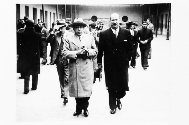 Norberto Antoni, Ministro de Gobierno, Justica e Instrucción Pública de la Provincia de Tucumán junto al gobernador Miguel Campero, de quien era su sobrino. Década de 1930.